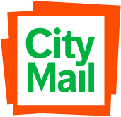 CityMail Sweden AB logga.